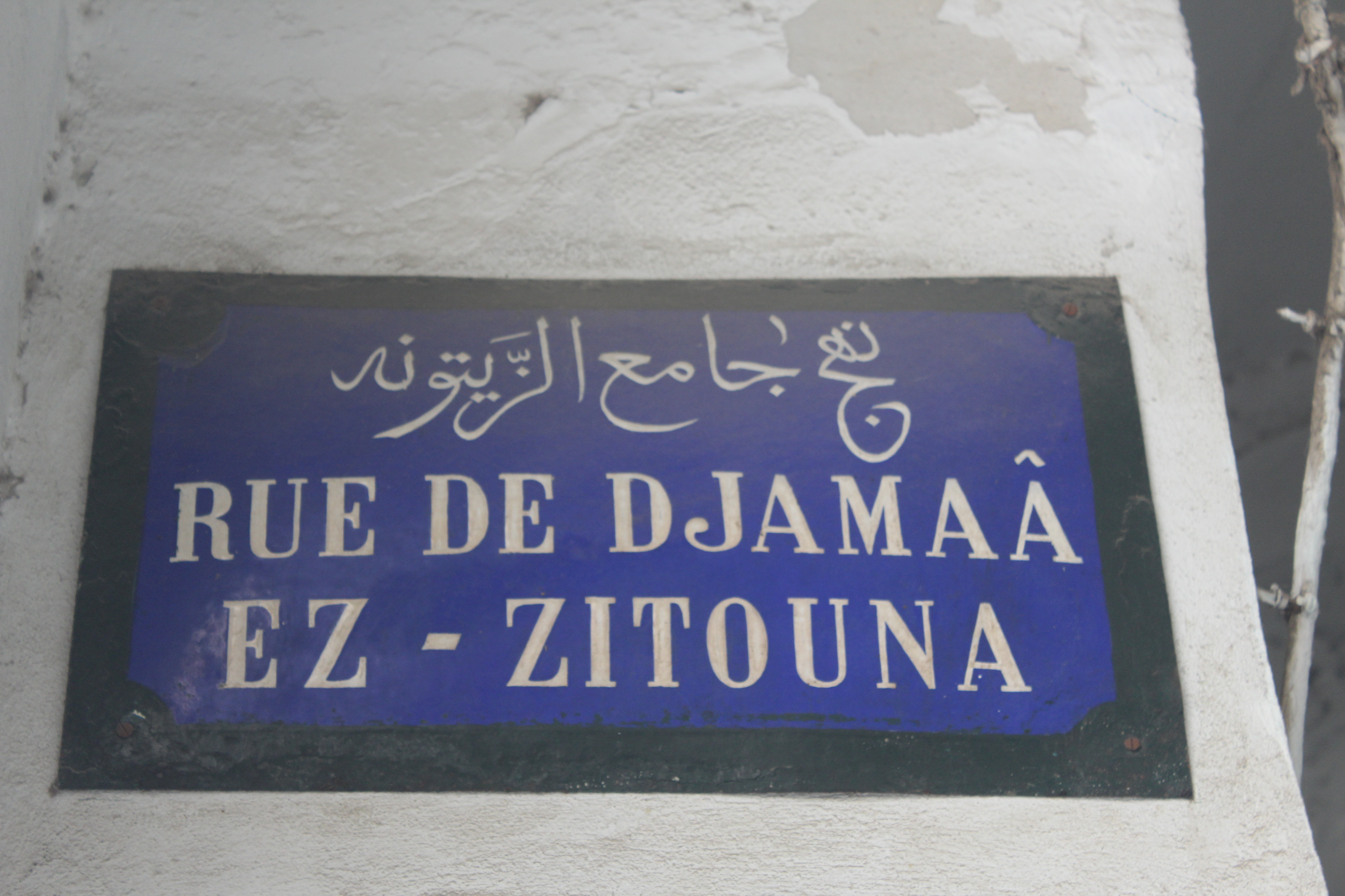 La médina de Tunis مدينة تونس العتيقة